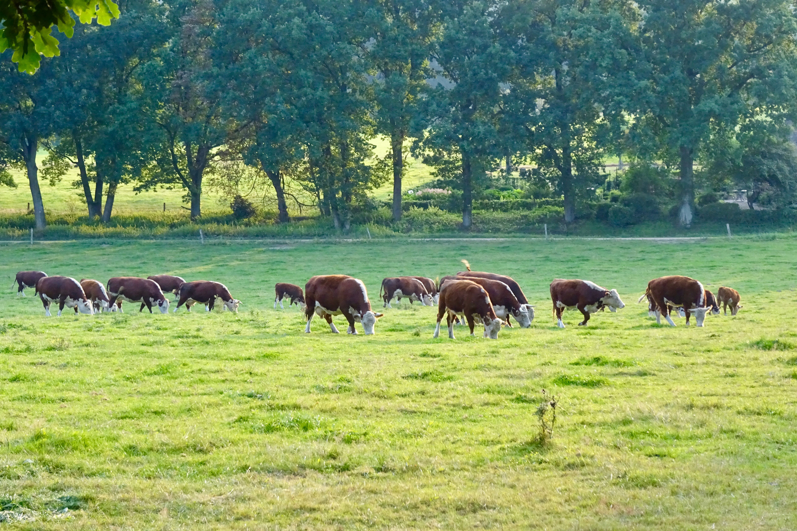 het Landgoed Heuven nabij Rheden